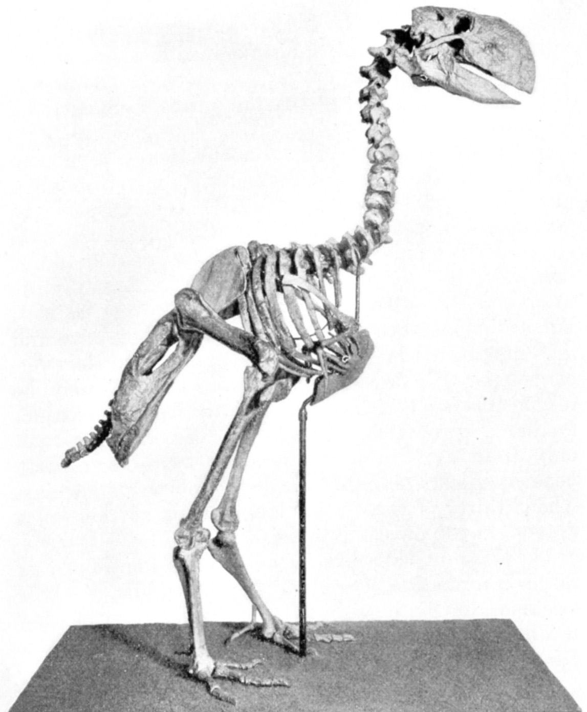 Gastornis skeleton.